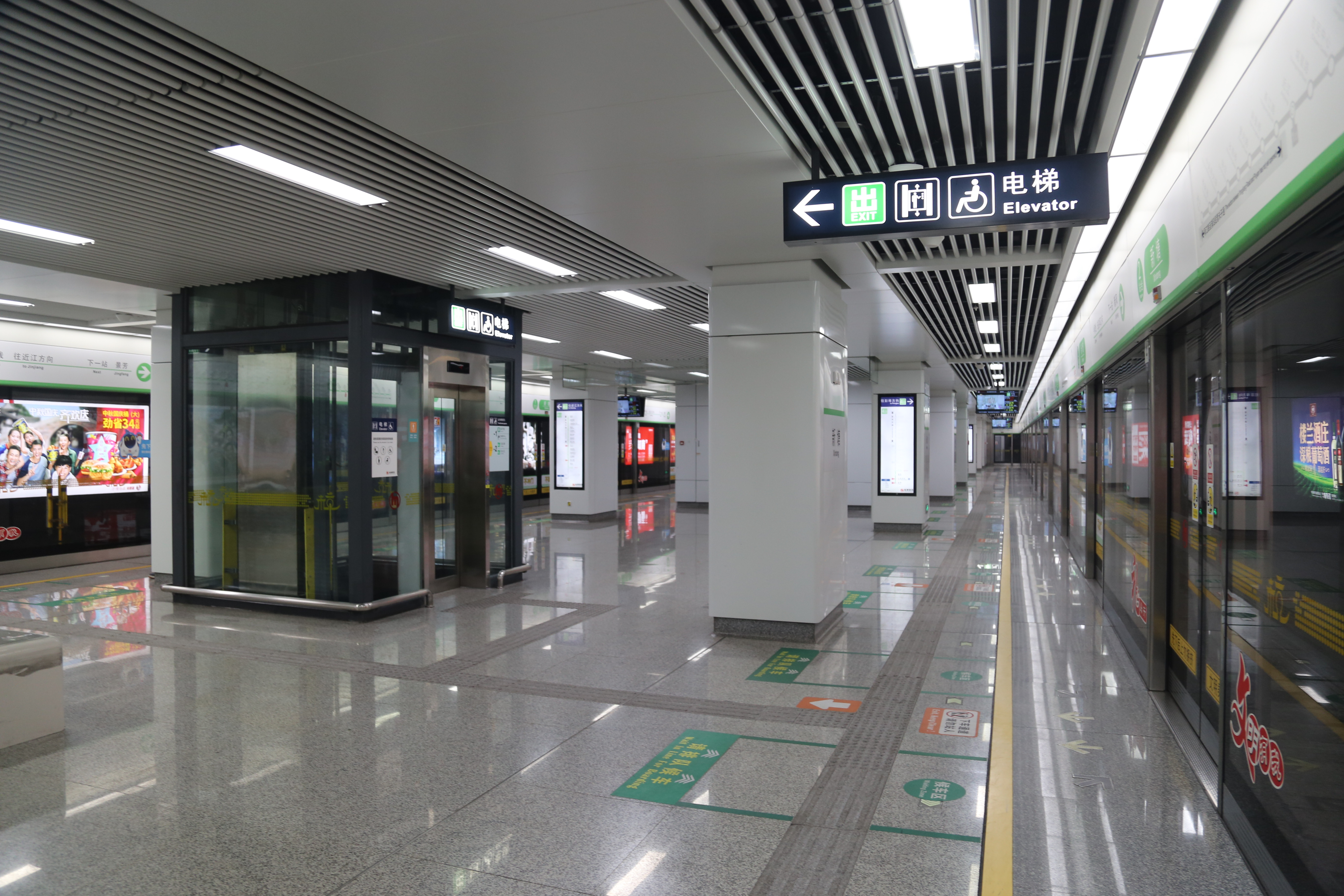 杭州地铁4号线新塘站站台